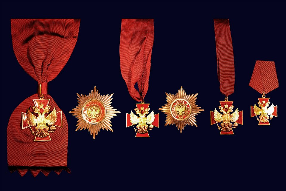 Ордена "За заслуги перед Отечеством" I-IV степеней, которыми был награжден В. С. Черномырдин, переданы в фонды Историко-мемориального музея Виктора Степановича Черномырдина на основании распоряжения Президента РФ "О дополнительных мерах по увековечению памяти В. С. Черномырдина" от 22.12.2014 № 405-рп.